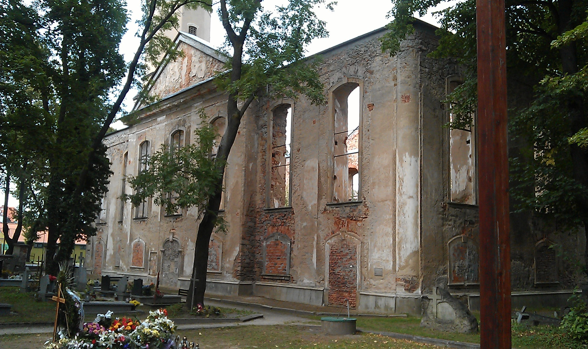 Südseite der evangelischen Kirchenruine in Miłków (früher Arnsdorf)